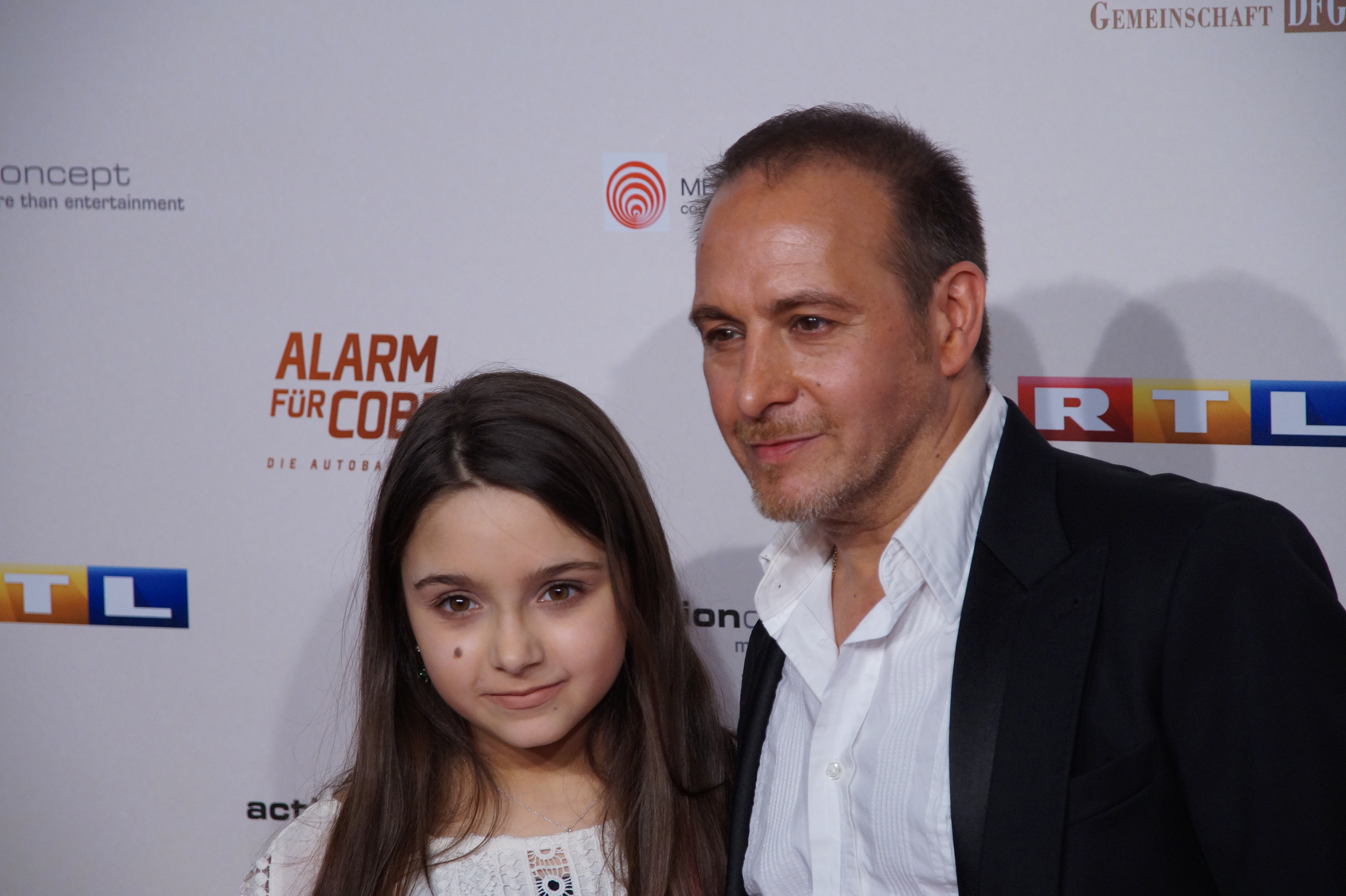 Pauletta Pollmann und Vater Erdoğan Atalay bei der Premiere von der 300. Folge 'Alarm für Cobra 11', April 2016.